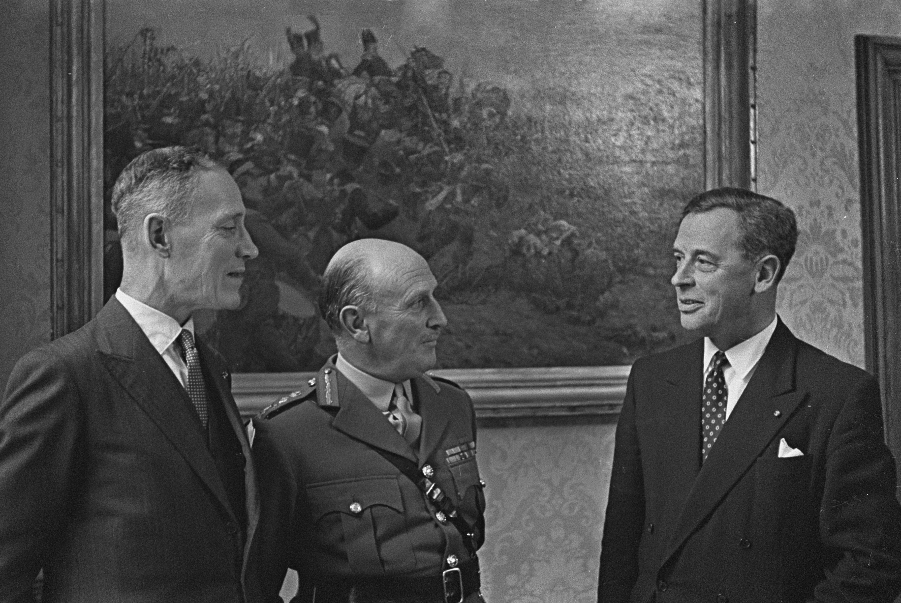 Collectie / Archief : Fotocollectie Anefo Reportage / Serie : [ onbekend ] Beschrijving : Afscheidsbezoek van Generaal Alfred Dudley Ward bij Minister Visser (Defensie) Datum : 30 november 1959 Trefwoorden : Afscheidsbezoeken, ministers Persoonsnaam : Generaal Alfred Dudley Ward, Visser, Sim Fotograaf : Pot, Harry / Anefo Auteursrechthebbende : Nationaal Archief Materiaalsoort : Negatief (zwart/wit) Nummer archiefinventaris : bekijk toegang 2.24.01.05 Bestanddeelnummer : 910-8522